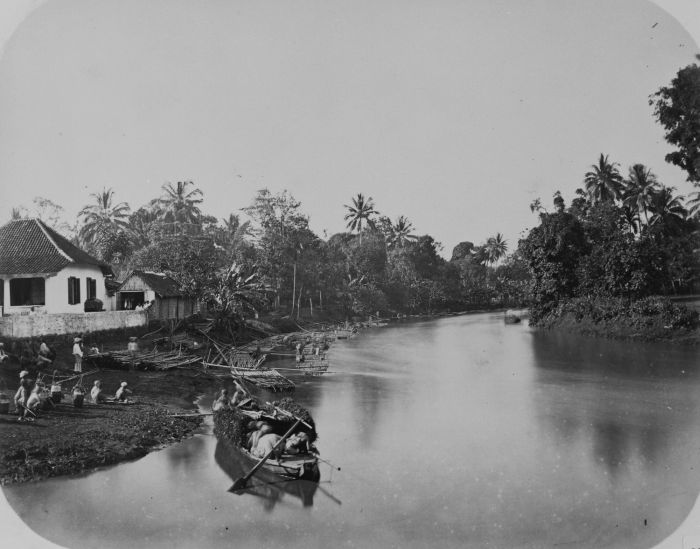 foto. Verkopers, een boot, vlotten van bamboe en een huis bij een bocht in de Ciliwung-rivier bij Parapattan, Batavia